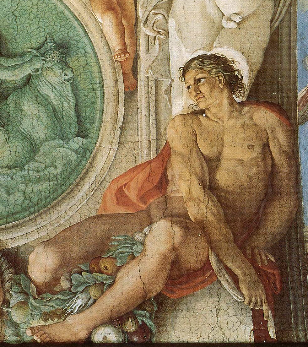 detail